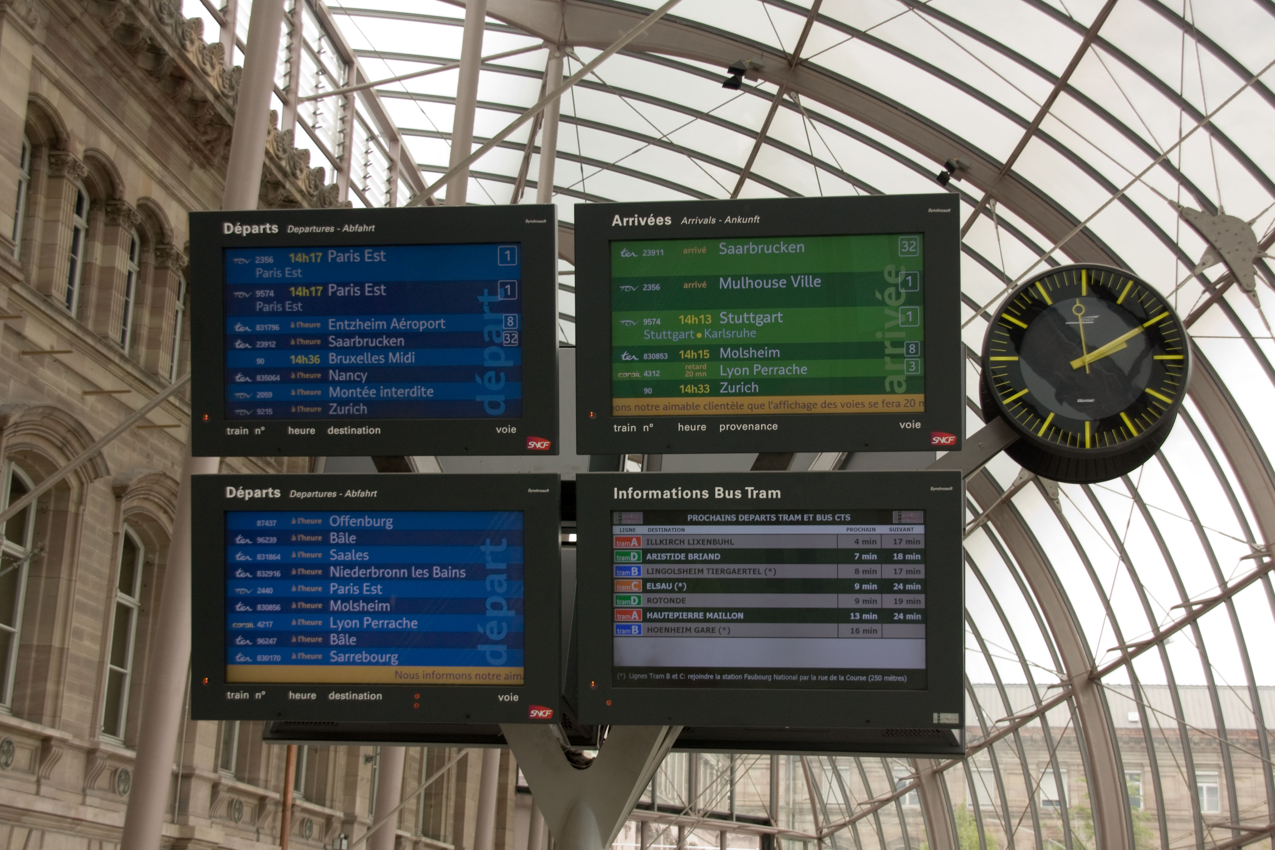 Gare de Strasbourg, écrans d'informations